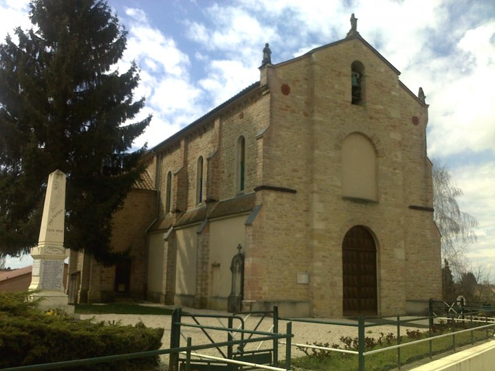 Eglise de Brienne, sans clocher apparent